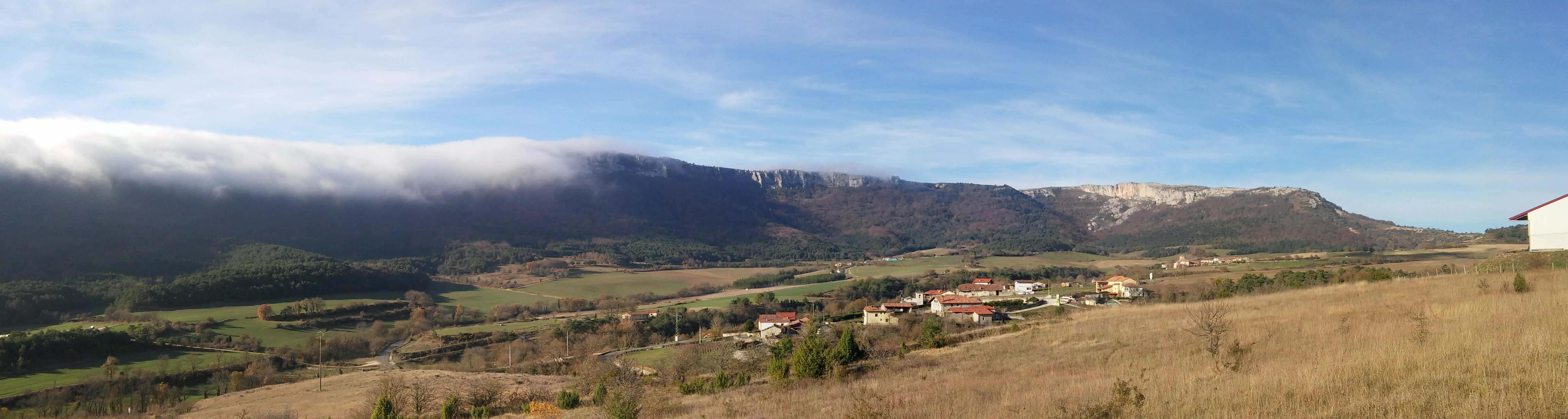 Arkamu mendilerroa, Artxua herria aurrean eta Luna herria atzean